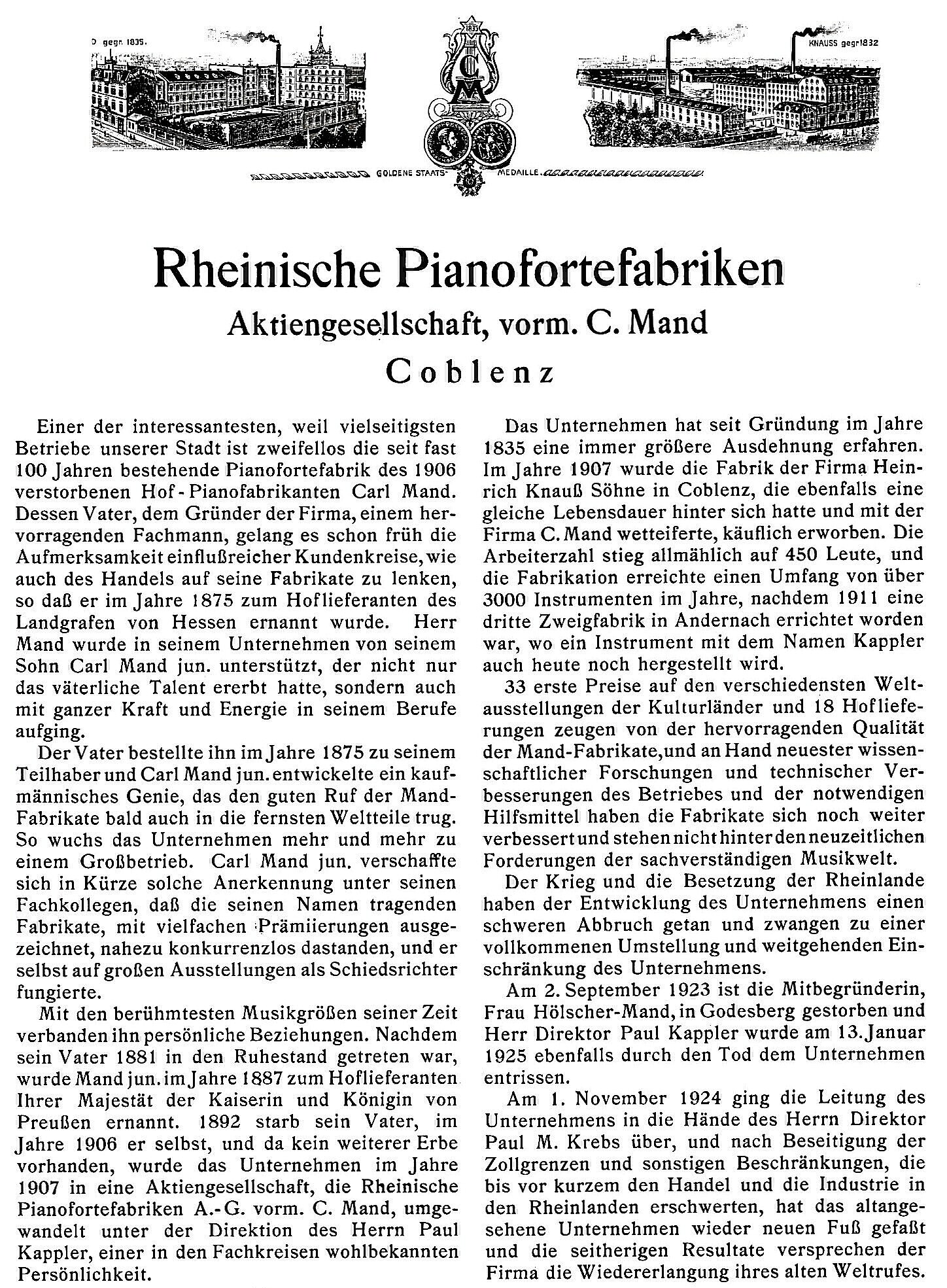 Werbeanzeige der Rheinische Pianofortefabriken Aktiengesellschaft von 1926